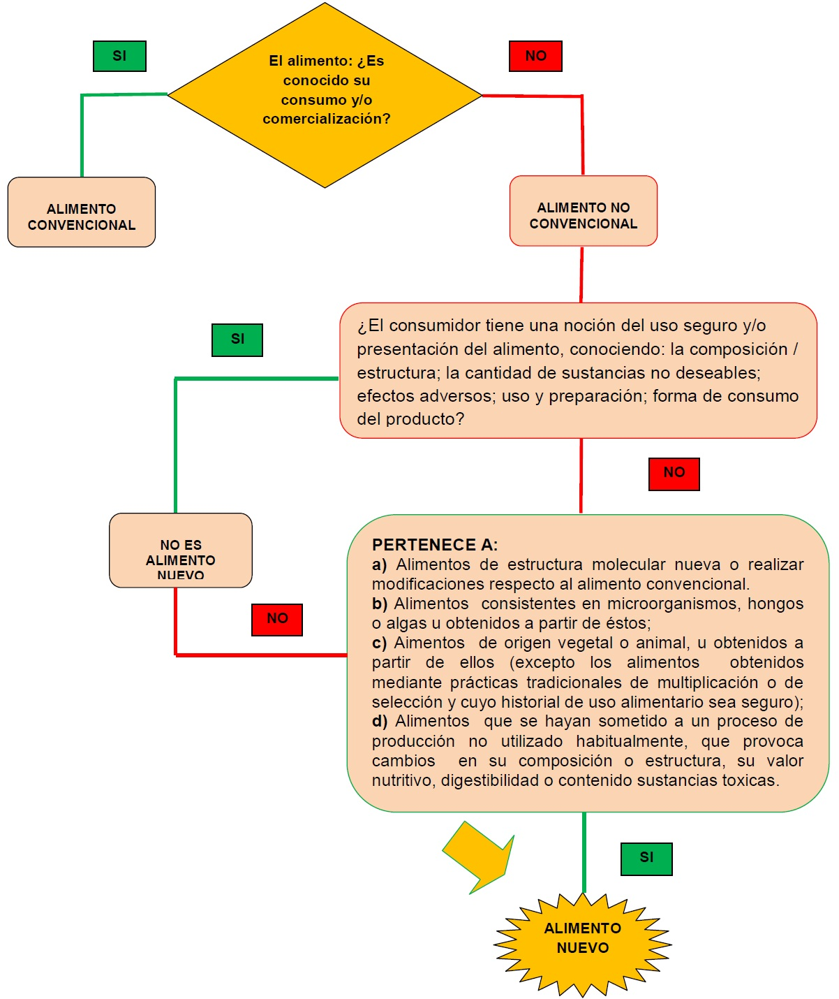 Árbol desición